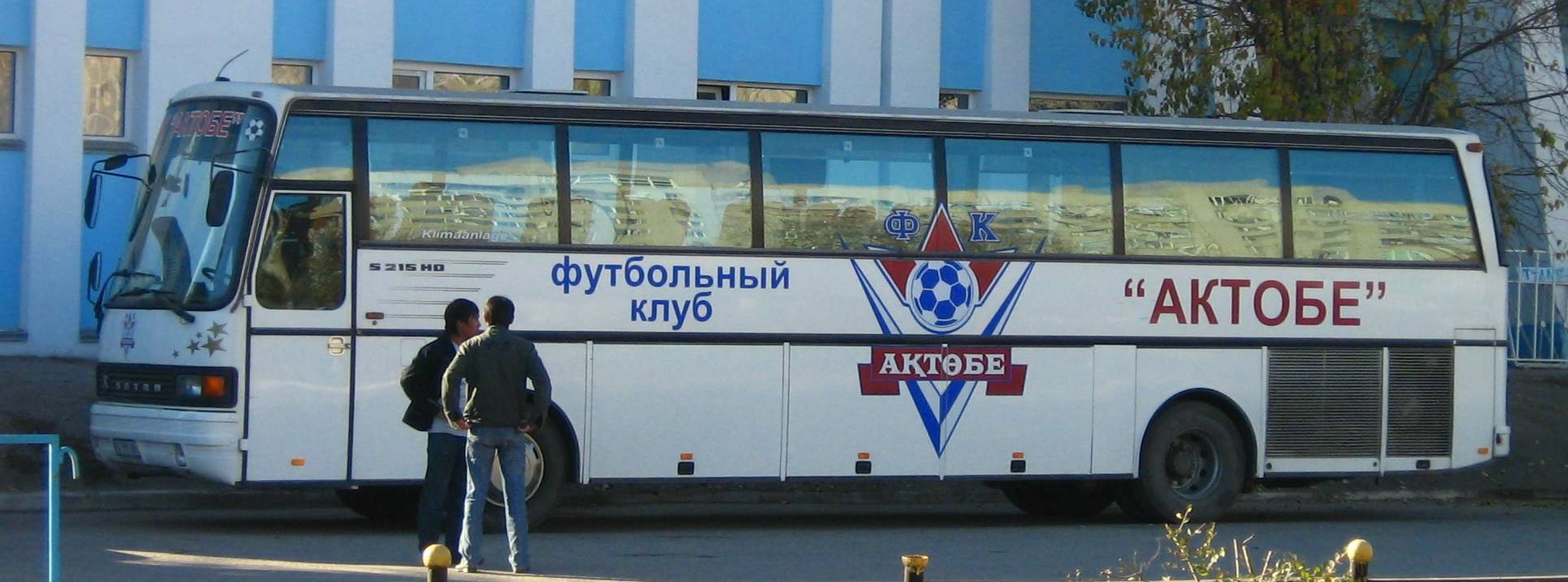 FC Aktobe bus